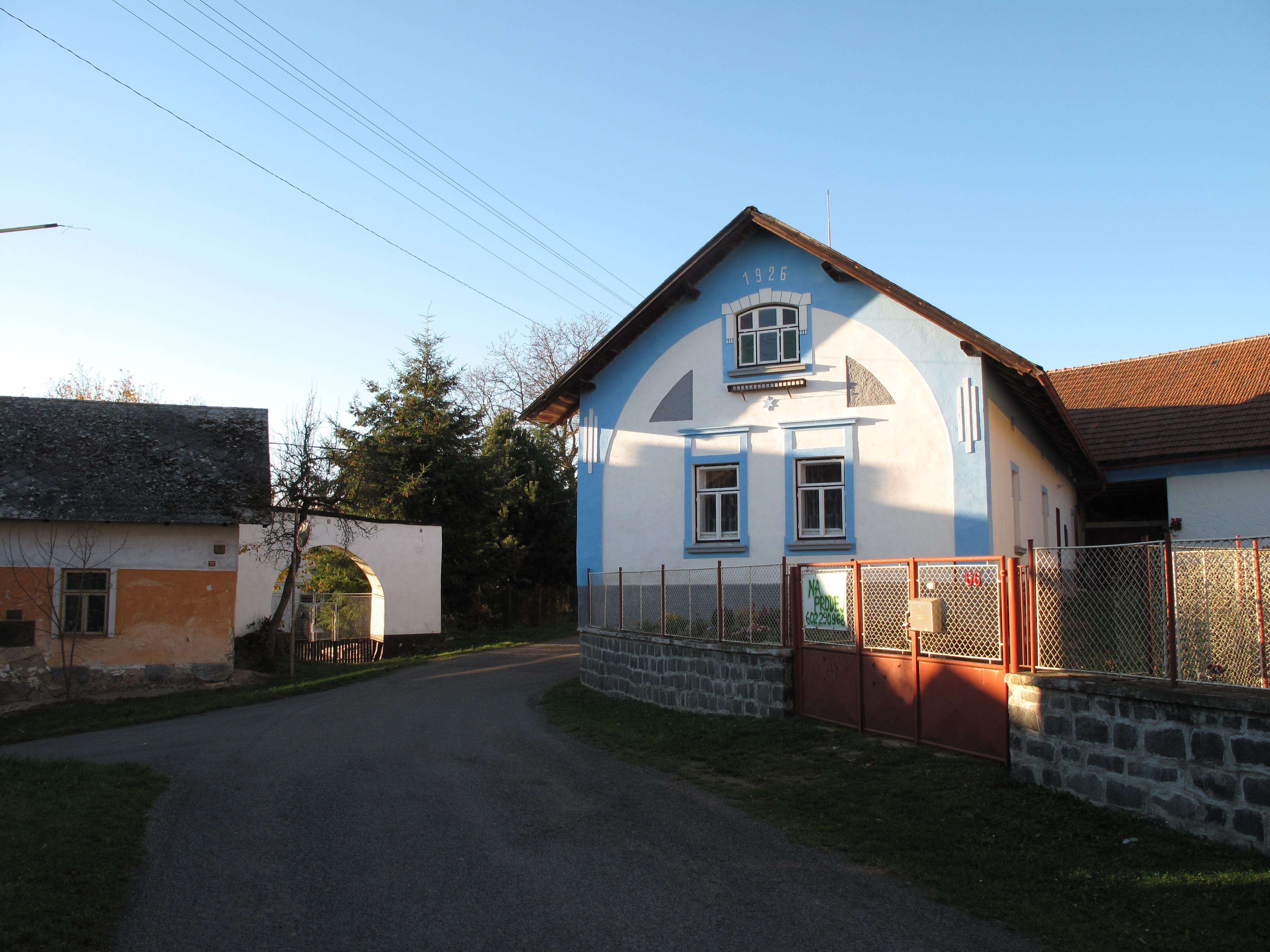 Domy v Leleticích. Okres Příbram, Česká republika.